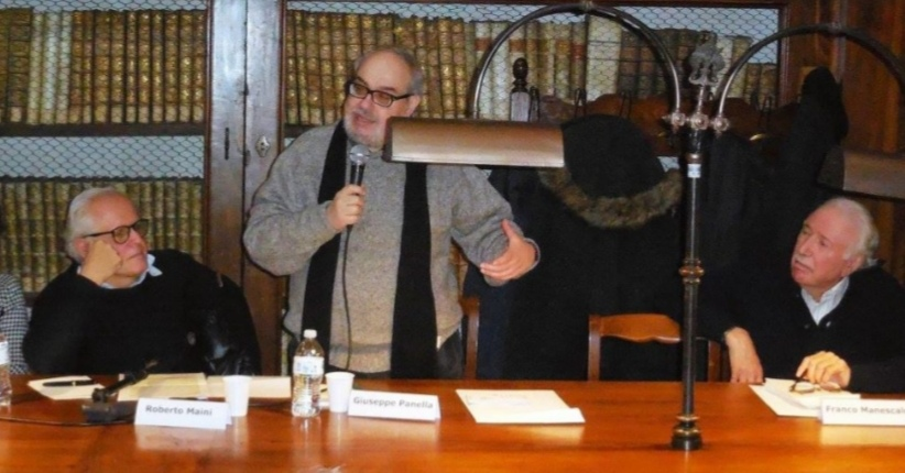 Giuseppe Panella con Franco Manescalchi alla Biblioteca Marcellina di Firenze